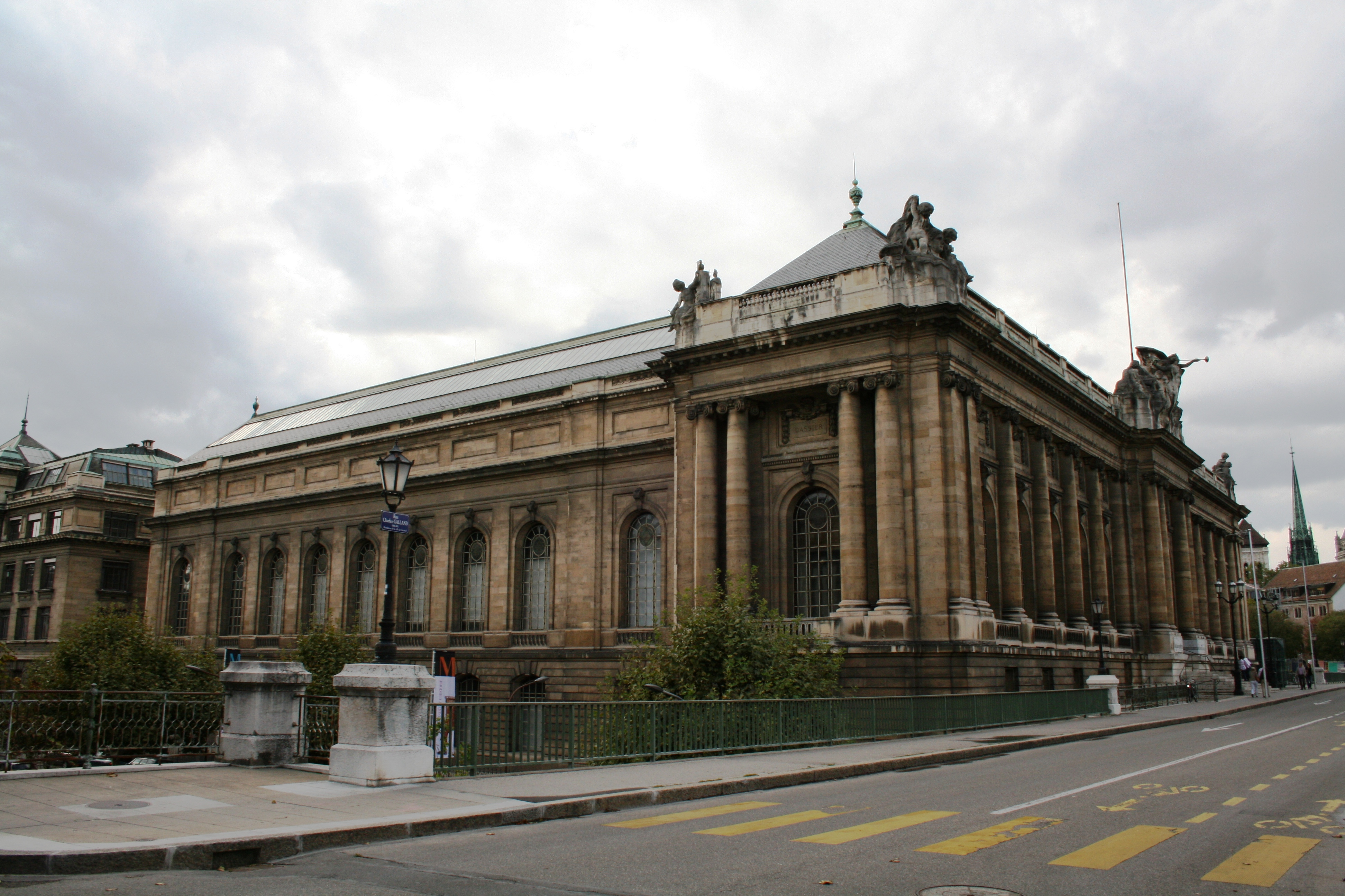 Façade nord et est du Musée d'Art et d'Histoire de Genève, depuis la rue Charles Galland.